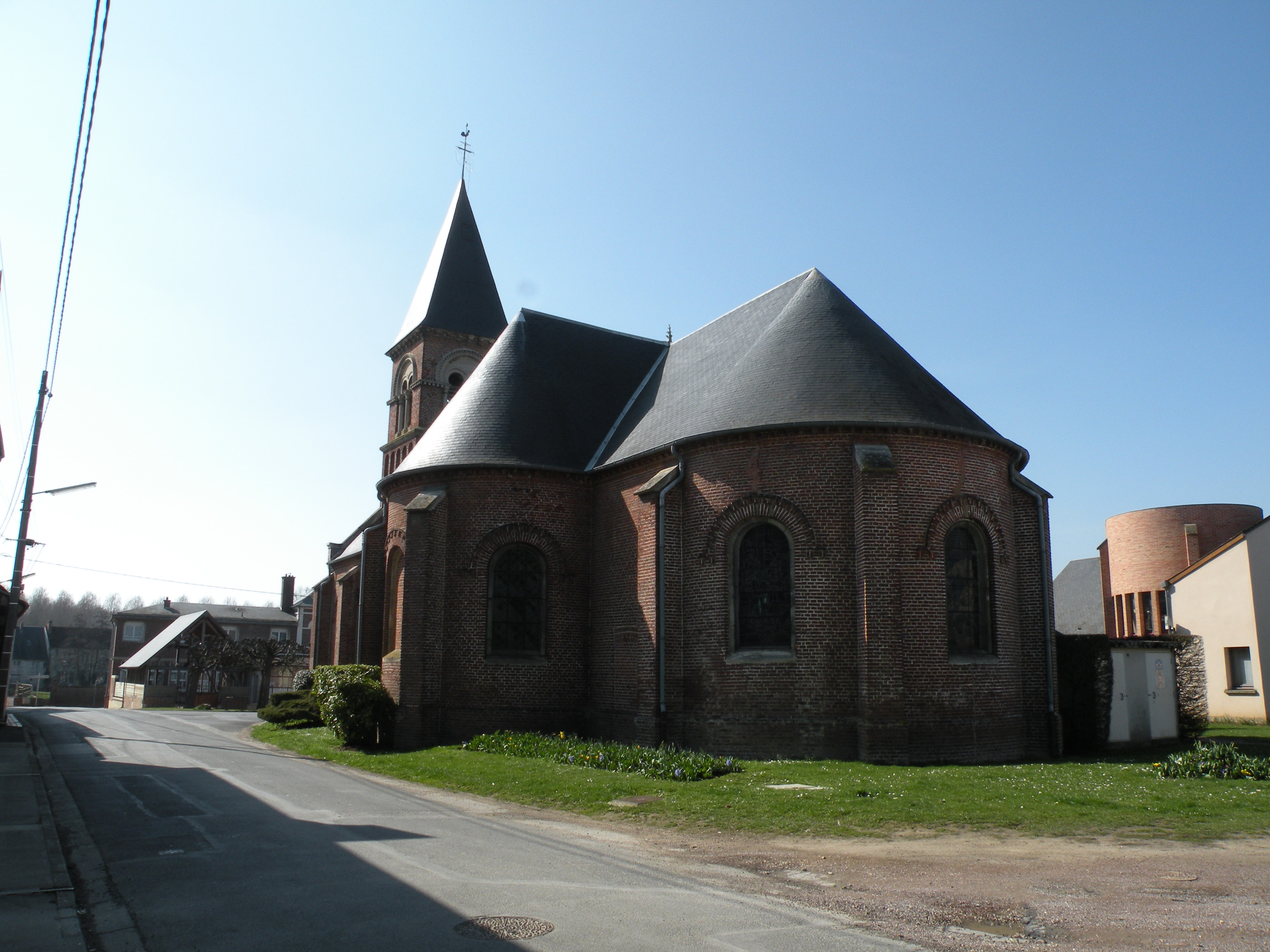 église de Rochy-Condé